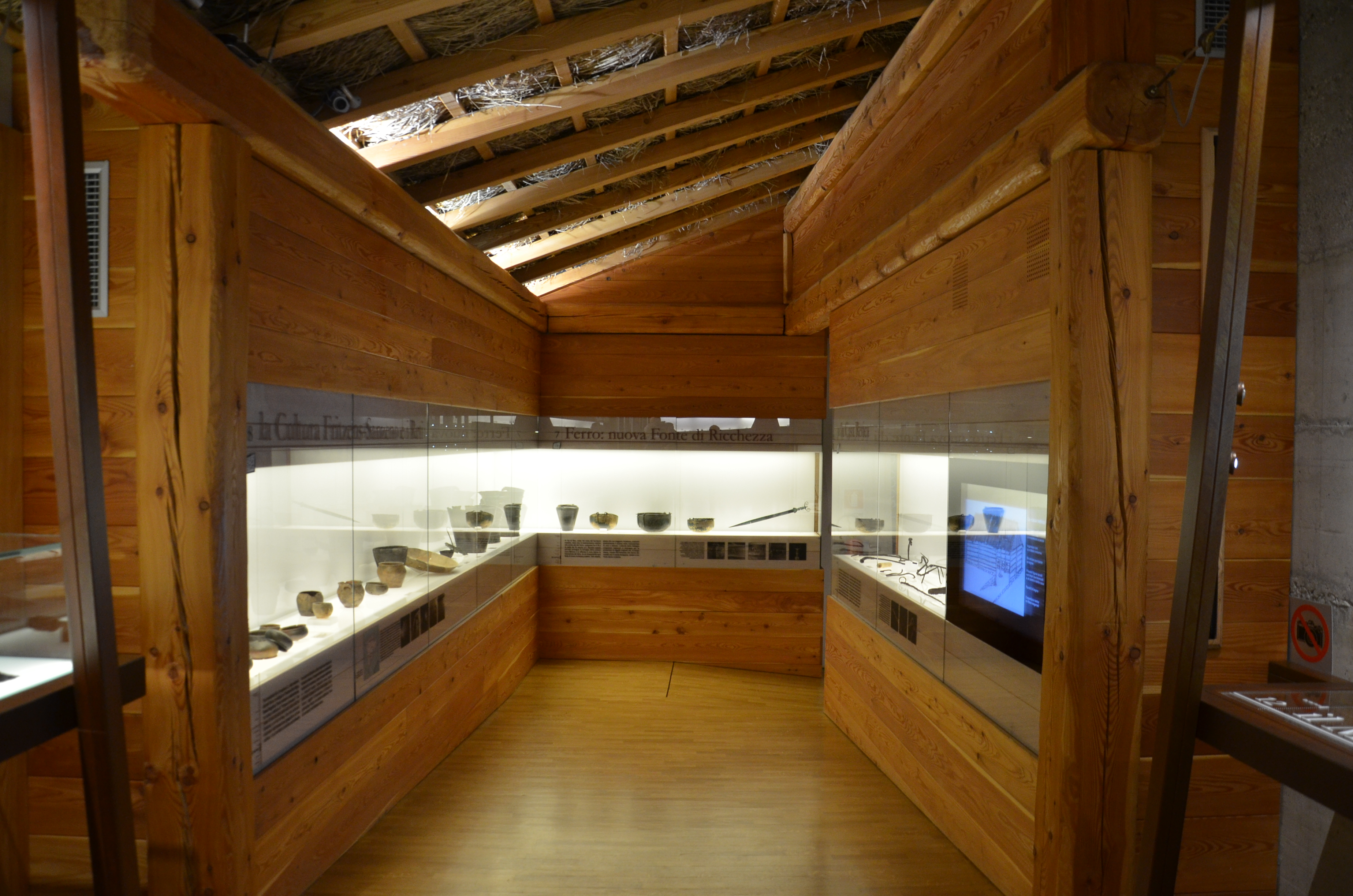 Museo retico This is a photo of a monument which is part of cultural heritage of Italy.